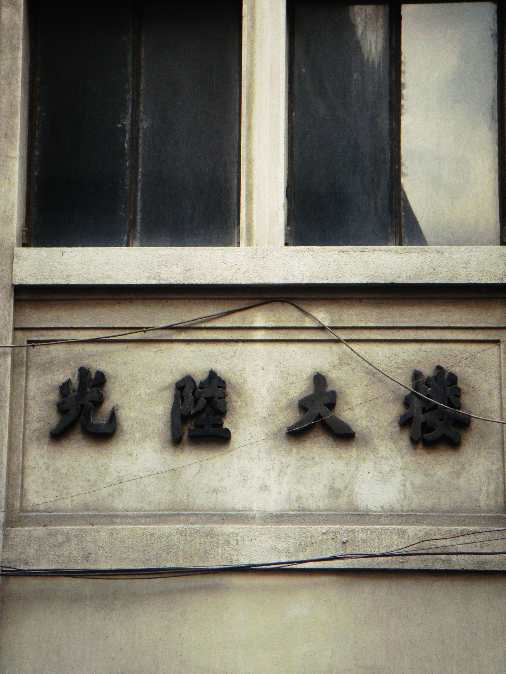 中文（中国大陆）: 光陆大楼的铭牌